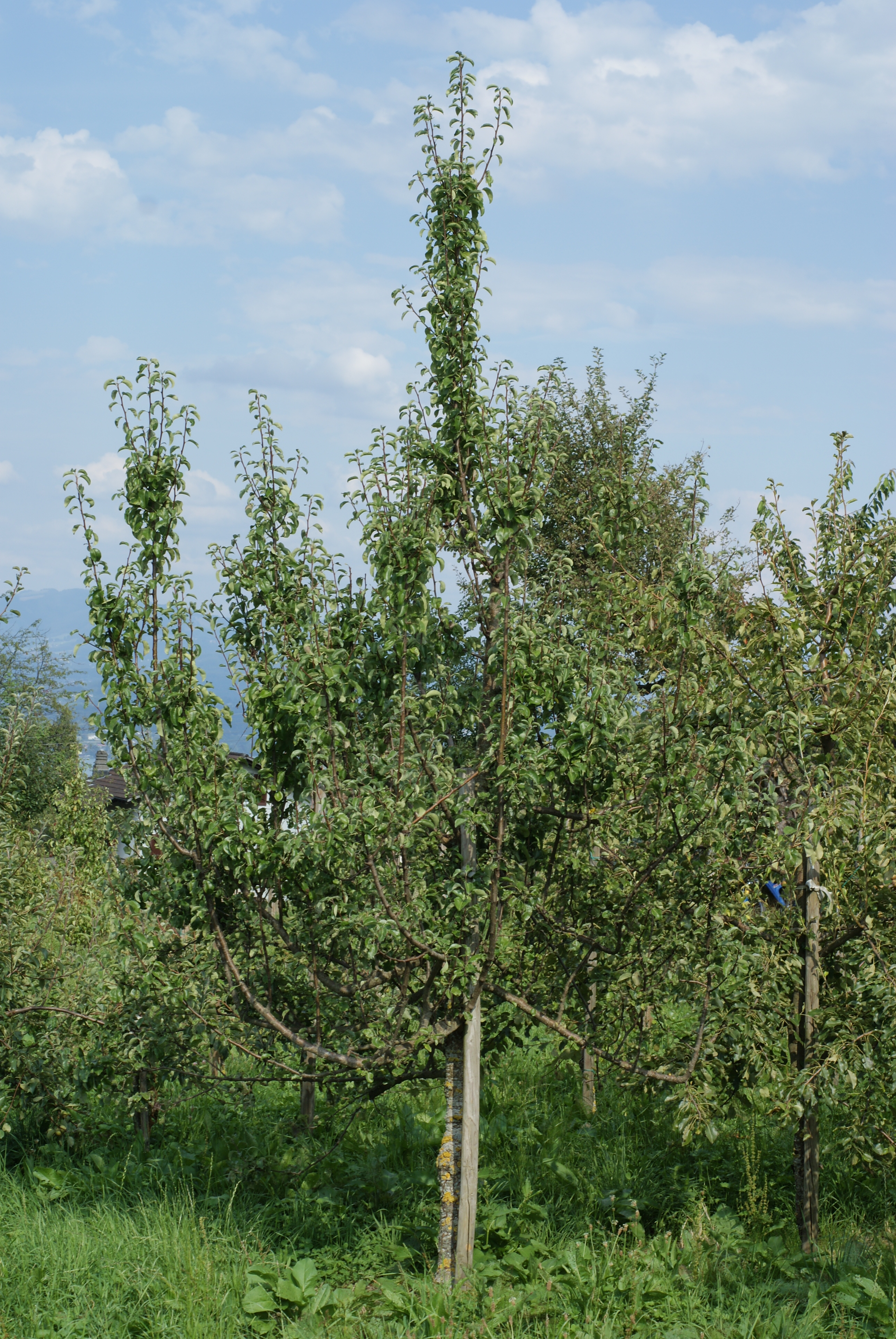 Etwa fünfjähriger Spindelbaum der Schweizer Birnensorte "Trübler". Die Unterlage ist Quitte.